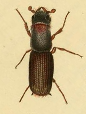 Wyrynnik dębowiec (Platypus cylindrus)